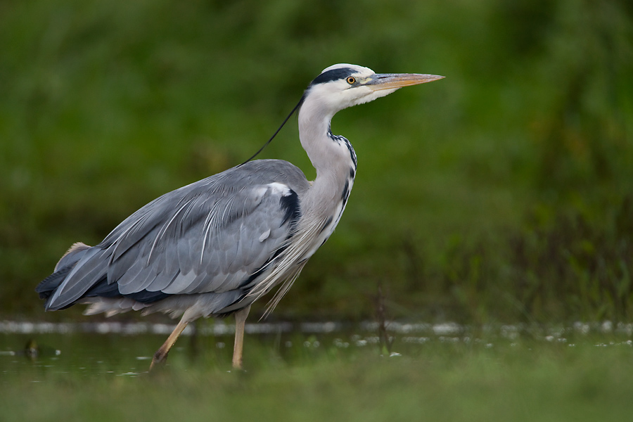 Ardea cinerea